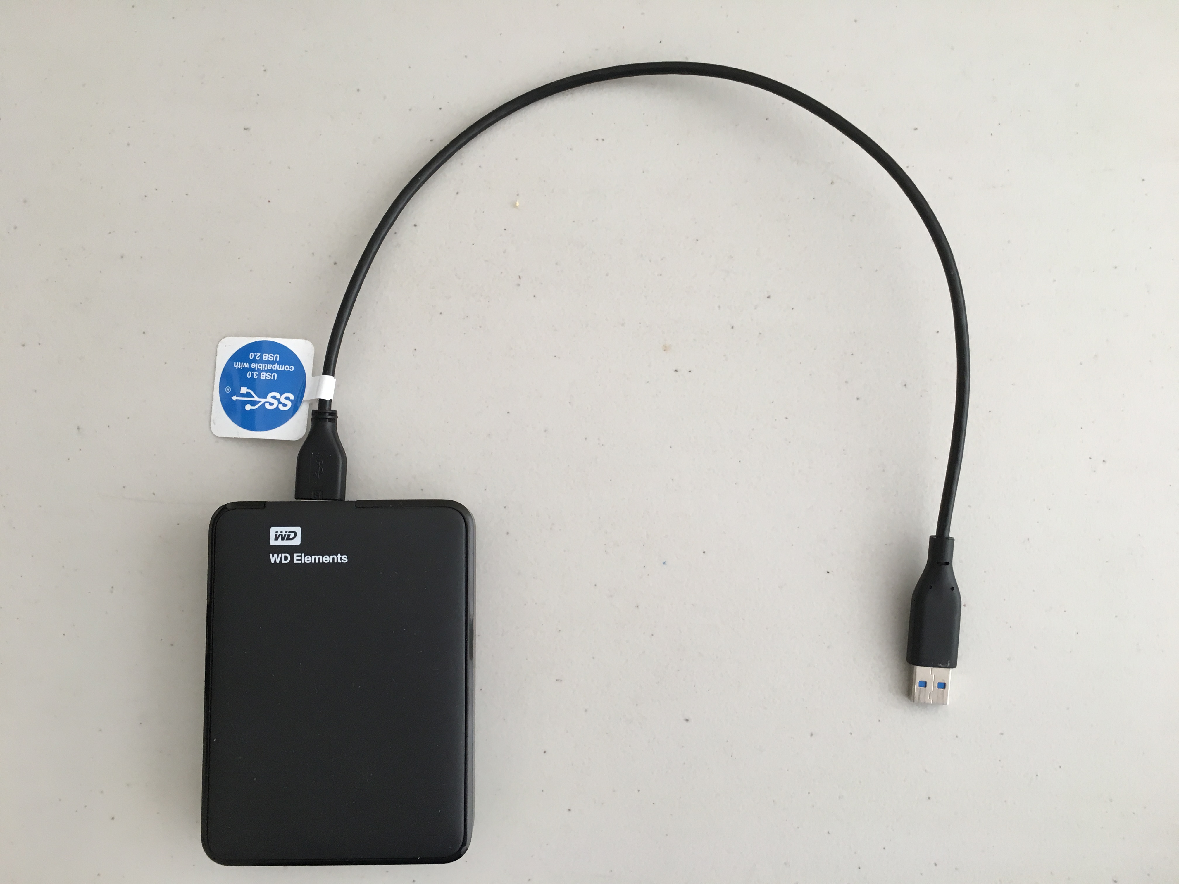 2TB WD Elements Portable